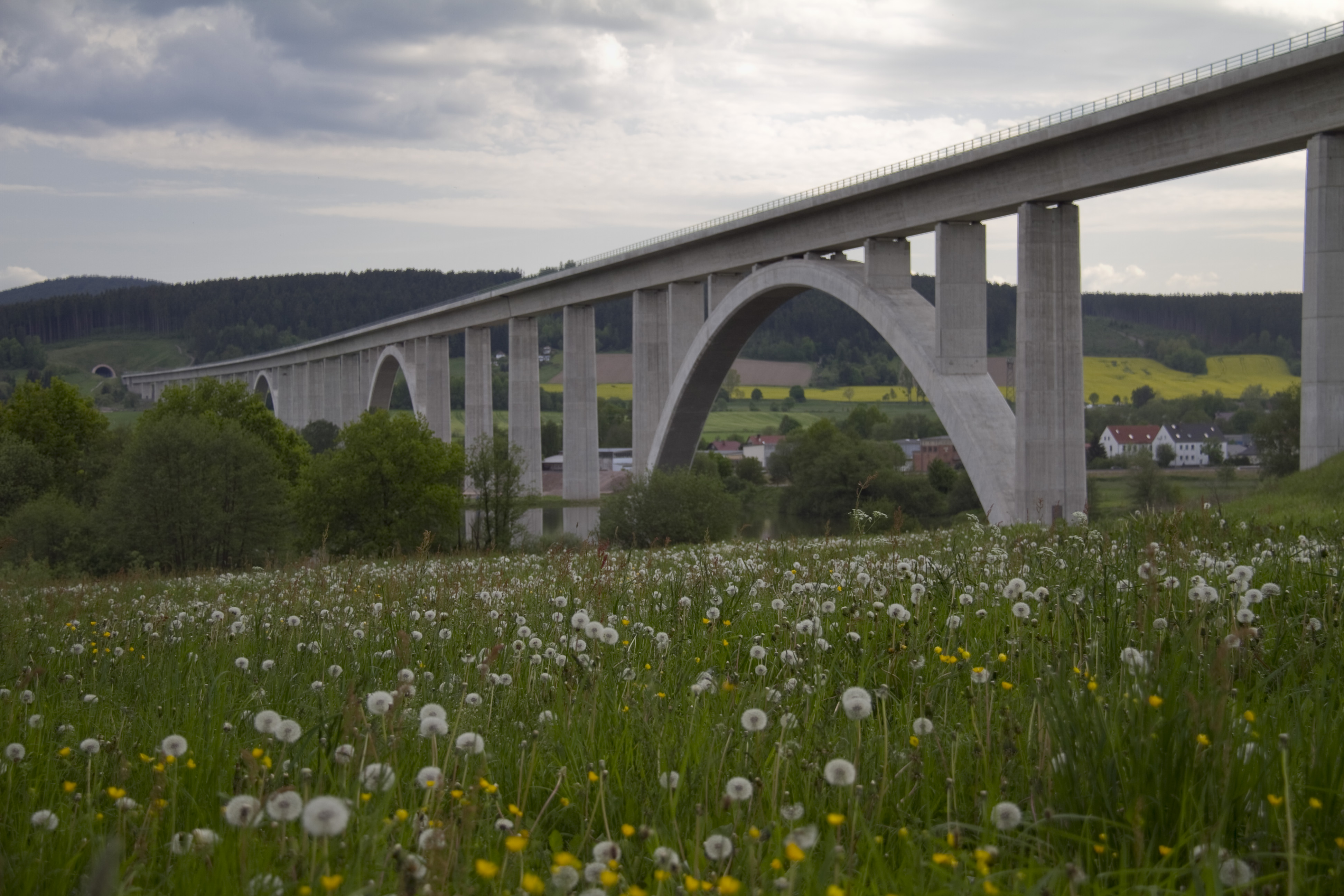 Ilmtalbrücke bei Langewiesen - Teil der Neubaustrecke Ebensfeld Erfurt